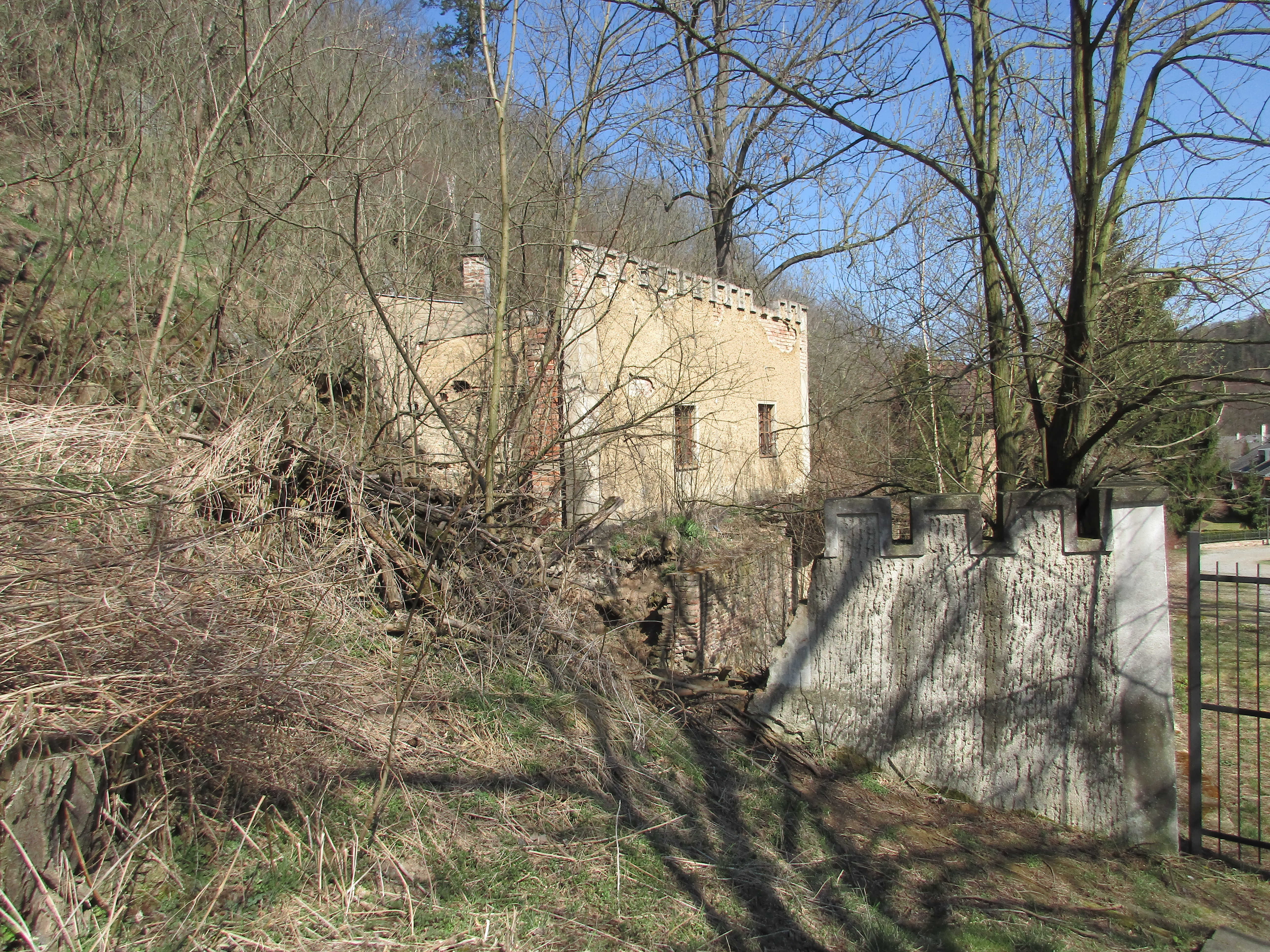 Bývalá usedlost Melinska, Nebušice čp. 44.